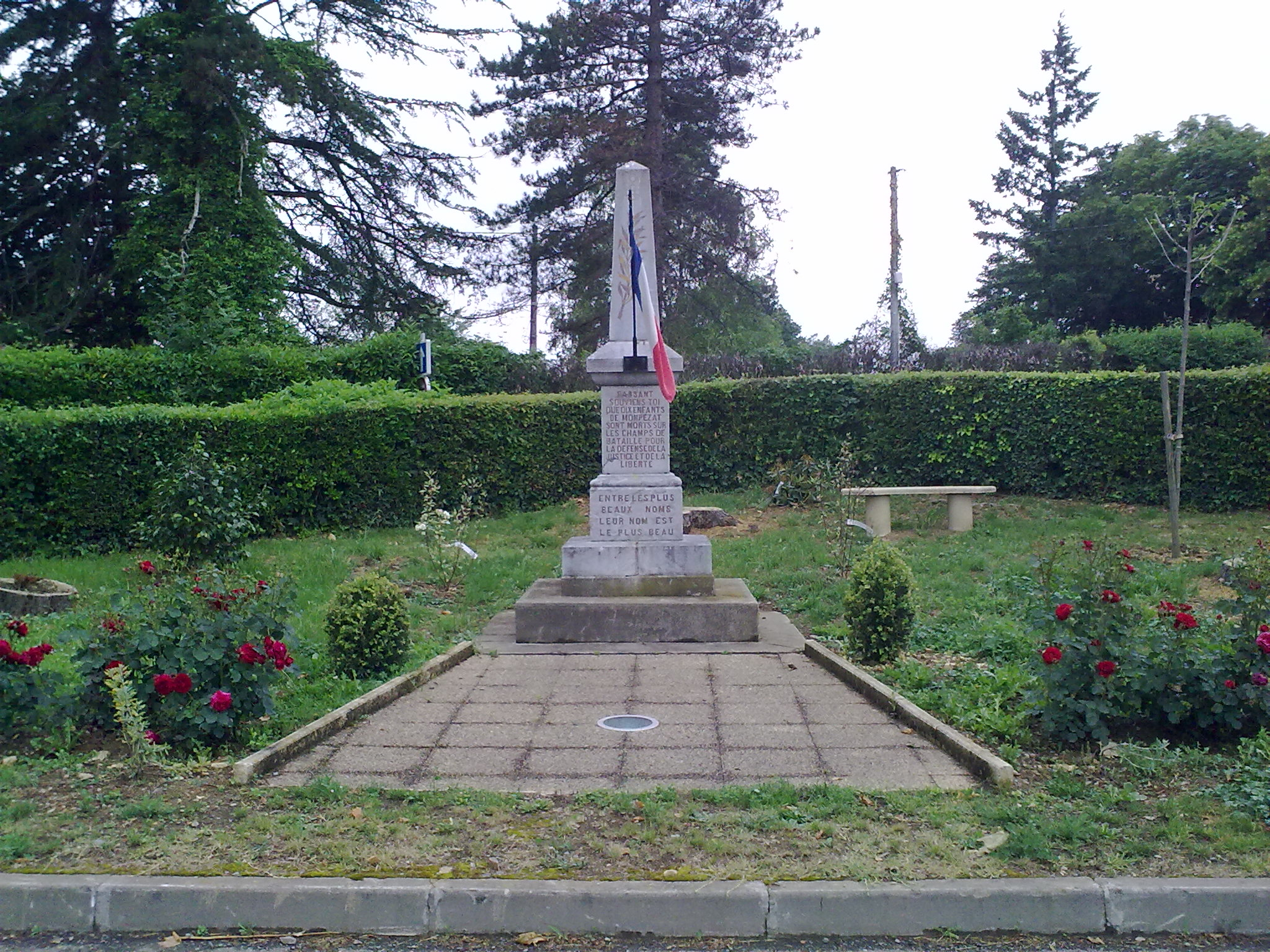 Monpezat